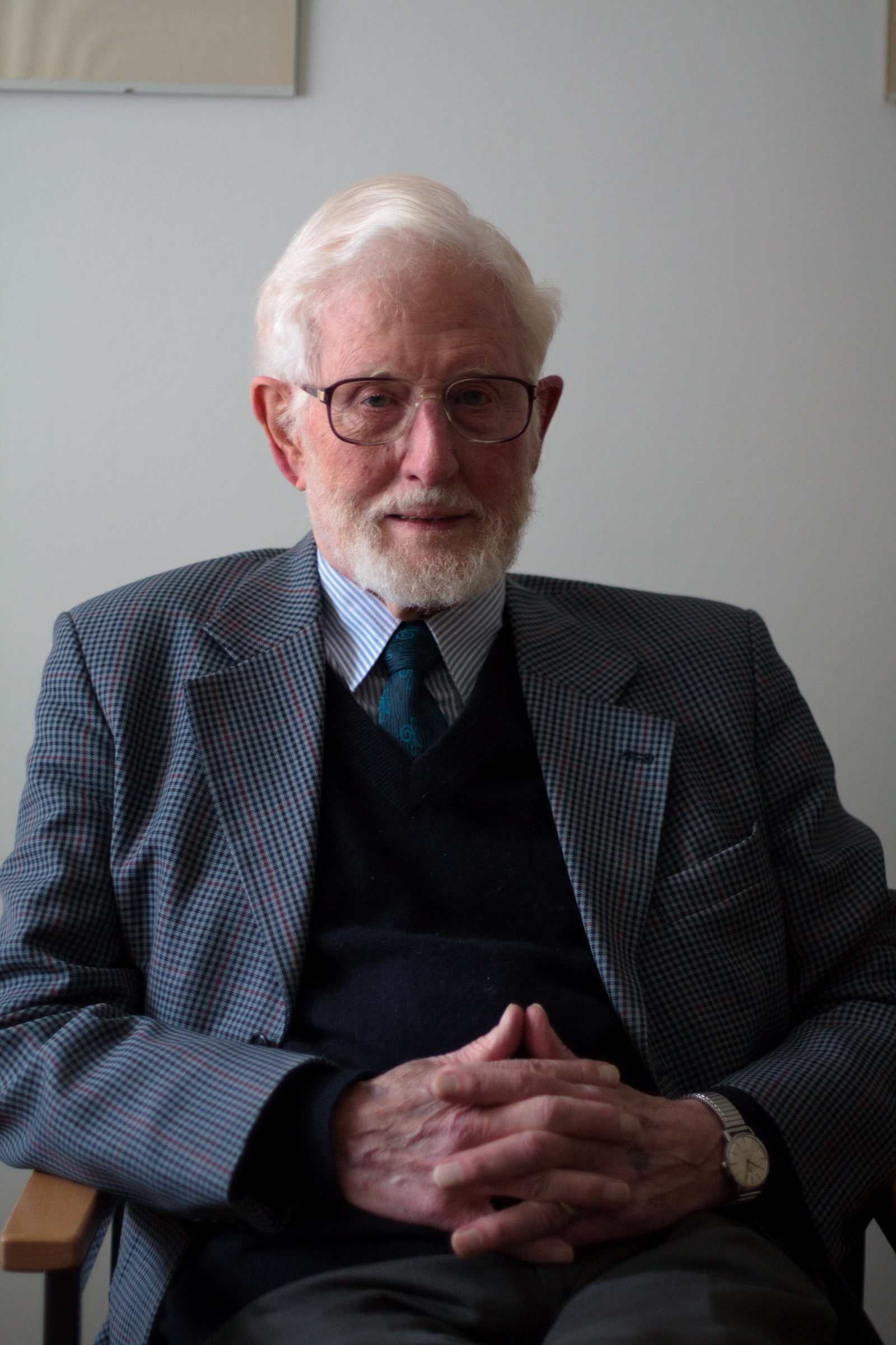 Carl Joachim Classen, klassischer Philologe zu Göttingen